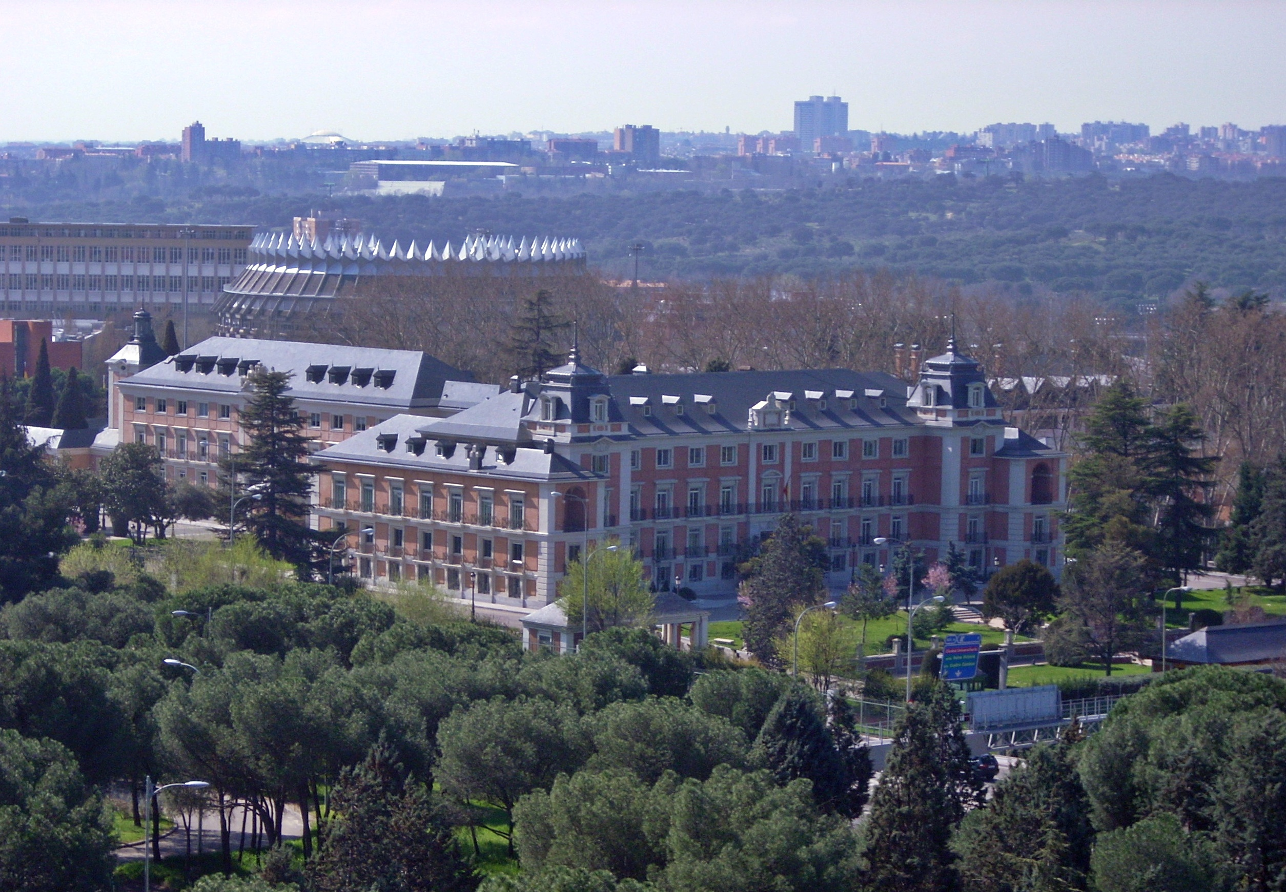 Vista del complejo de la Moncloa desde la Ciudad Universitaria